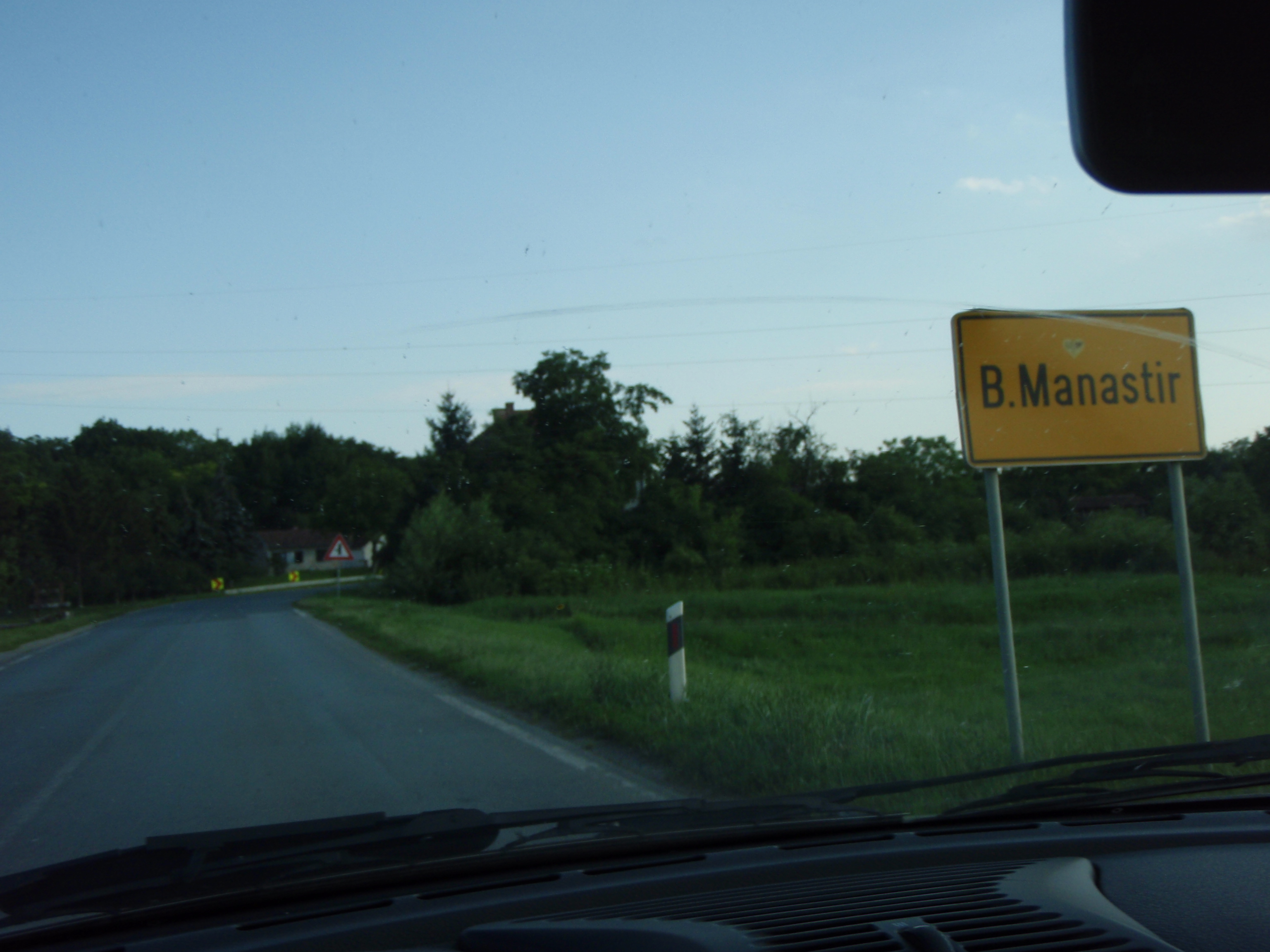 Ulaz u Beli Manastir.